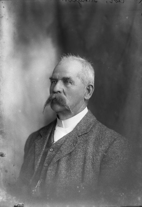 Walter Edward Gudgeon in 1911